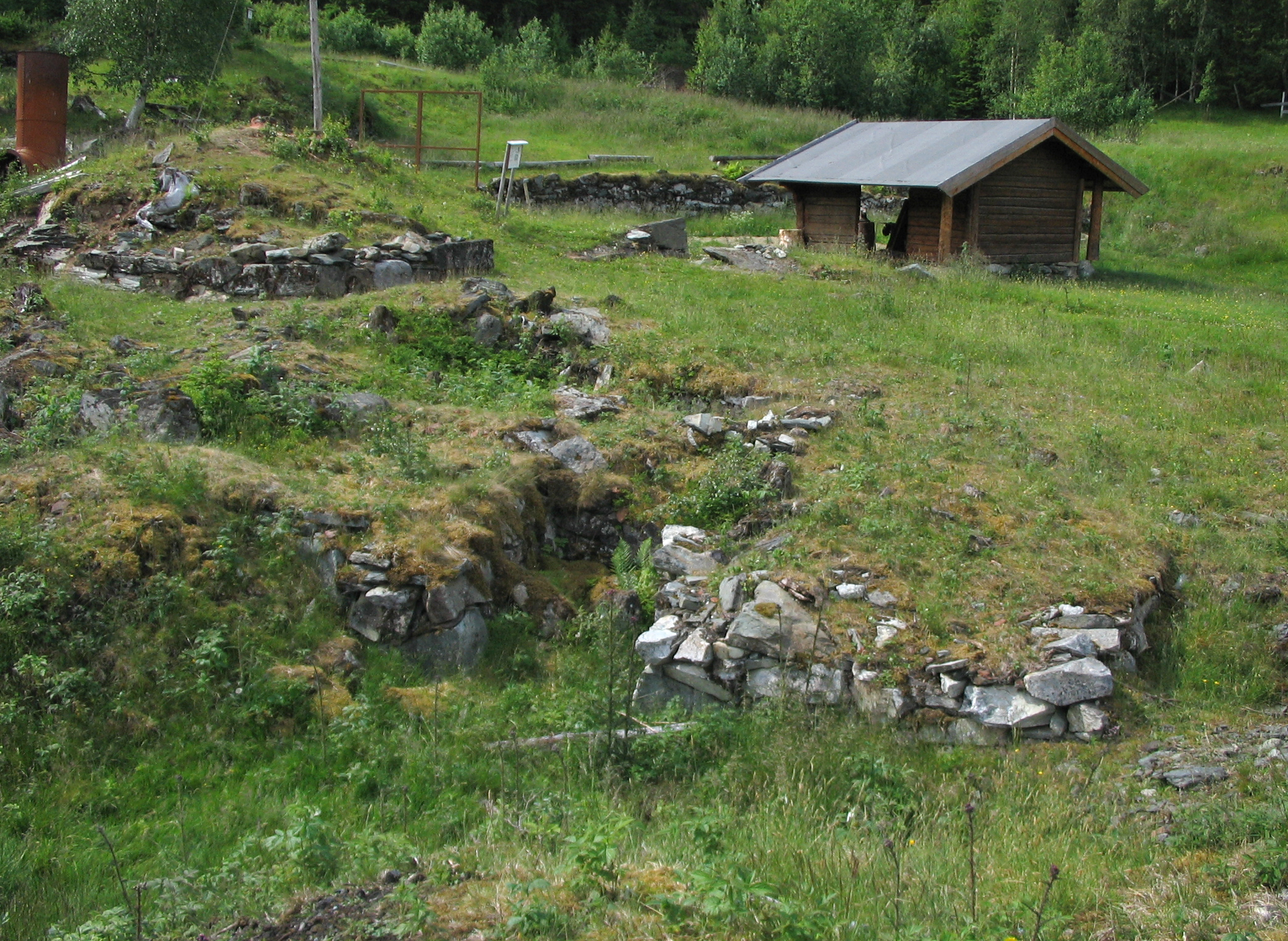 Restene etter Mostudmarka jernverk i Malvik The remains of Mostudmarka ironwork in Malvik